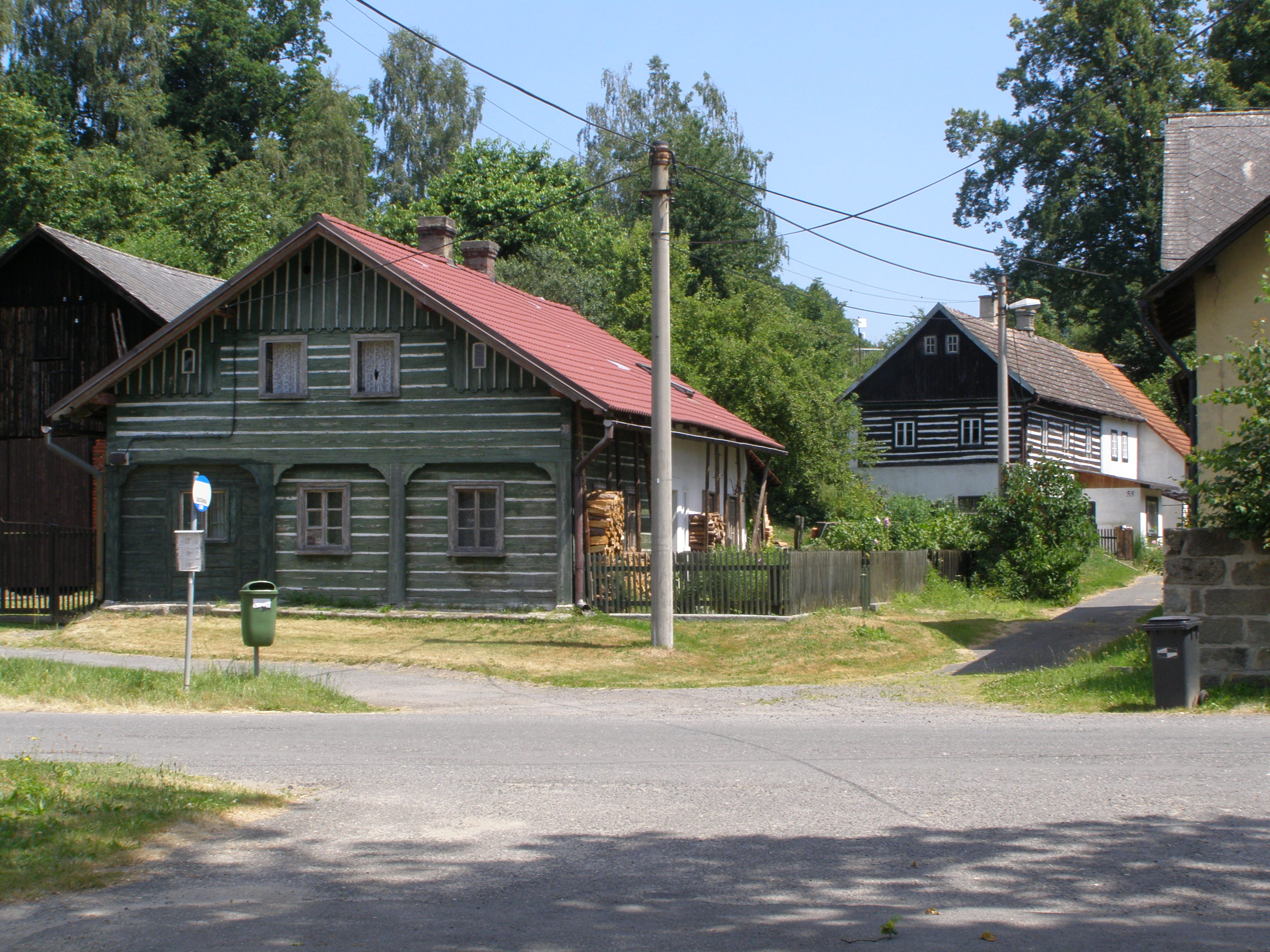 Česká Lípa, Písečná, domy v centru vesnice